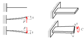 Déformation élastique : exemple des ressorts